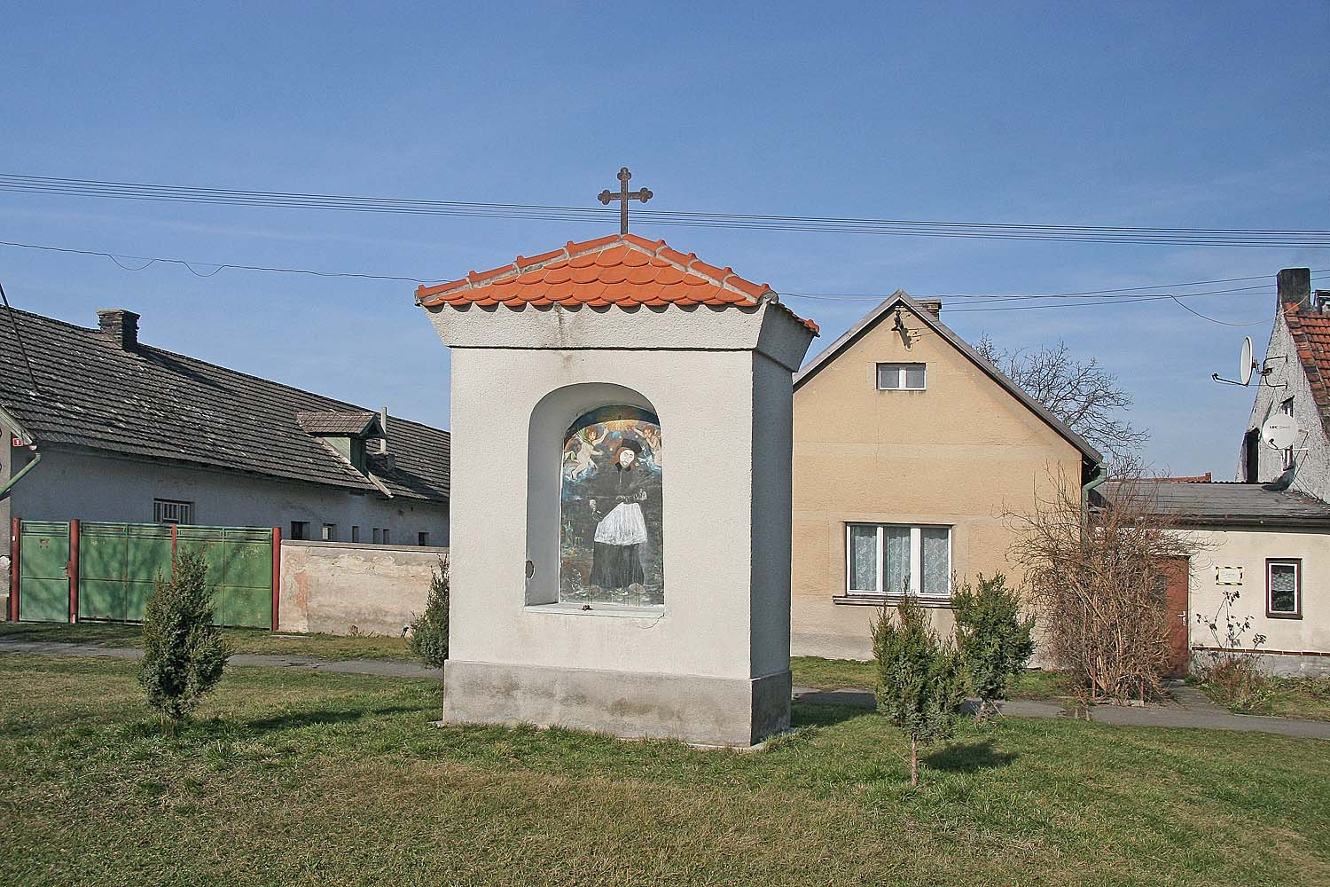 Veltruby - výklenková kaple na návsi, district Kolín autor: Prazak date: 5. 2. 2007